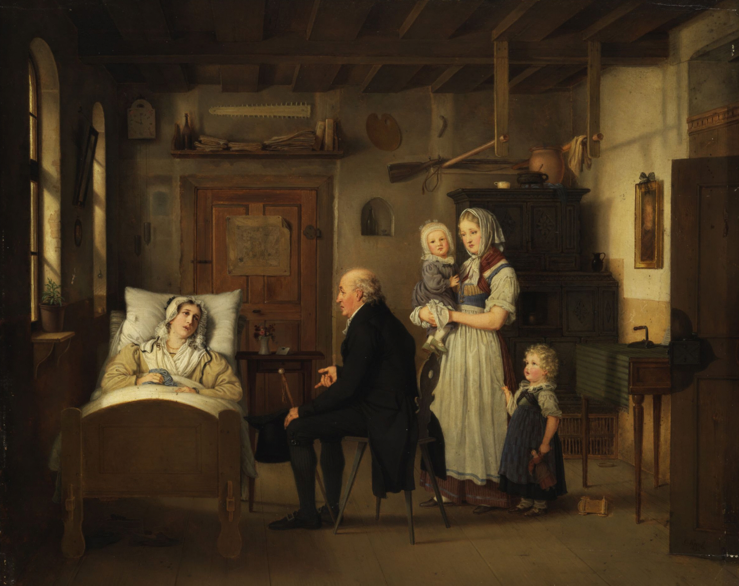 Johann Friedrich Karl Kreul: Der Krankenbesuch, Öl auf Holz. 54,5 x 65 cm.